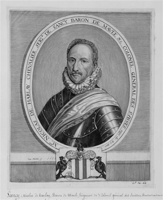 Portrait de Nicolas de Harlay, baron de Maule, seigneur de Sancy (1546-1629), surintendant des finances de Henri II, militaire et diplomate, premier maître d'hotel de Henri IV, Capitaine-colonel des Cent-Suisses de la Maison militaire du roi